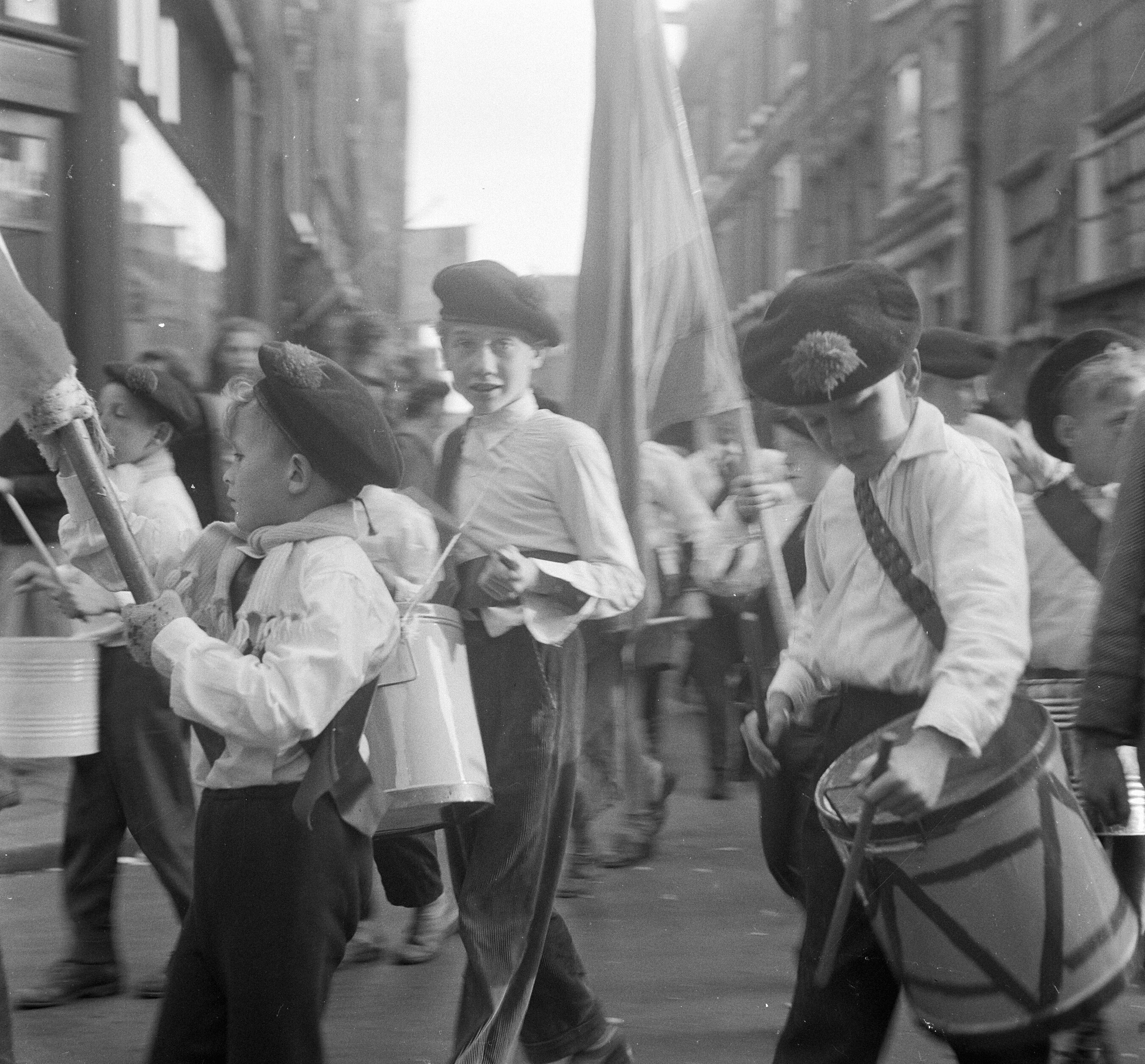 Collectie / Archief : Fotocollectie Anefo Reportage / Serie : [ onbekend ] Beschrijving : Luilak in de Jordaan Datum : 8 juni 1957 Locatie : Amsterdam, Noord-Holland Persoonsnaam : Jordaan Instellingsnaam : Luilak Fotograaf : Koch, Eric / Anefo Auteursrechthebbende : Nationaal Archief Materiaalsoort : Negatief (zwart/wit) Nummer archiefinventaris : bekijk toegang 2.24.01.03 Bestanddeelnummer : 908-6622